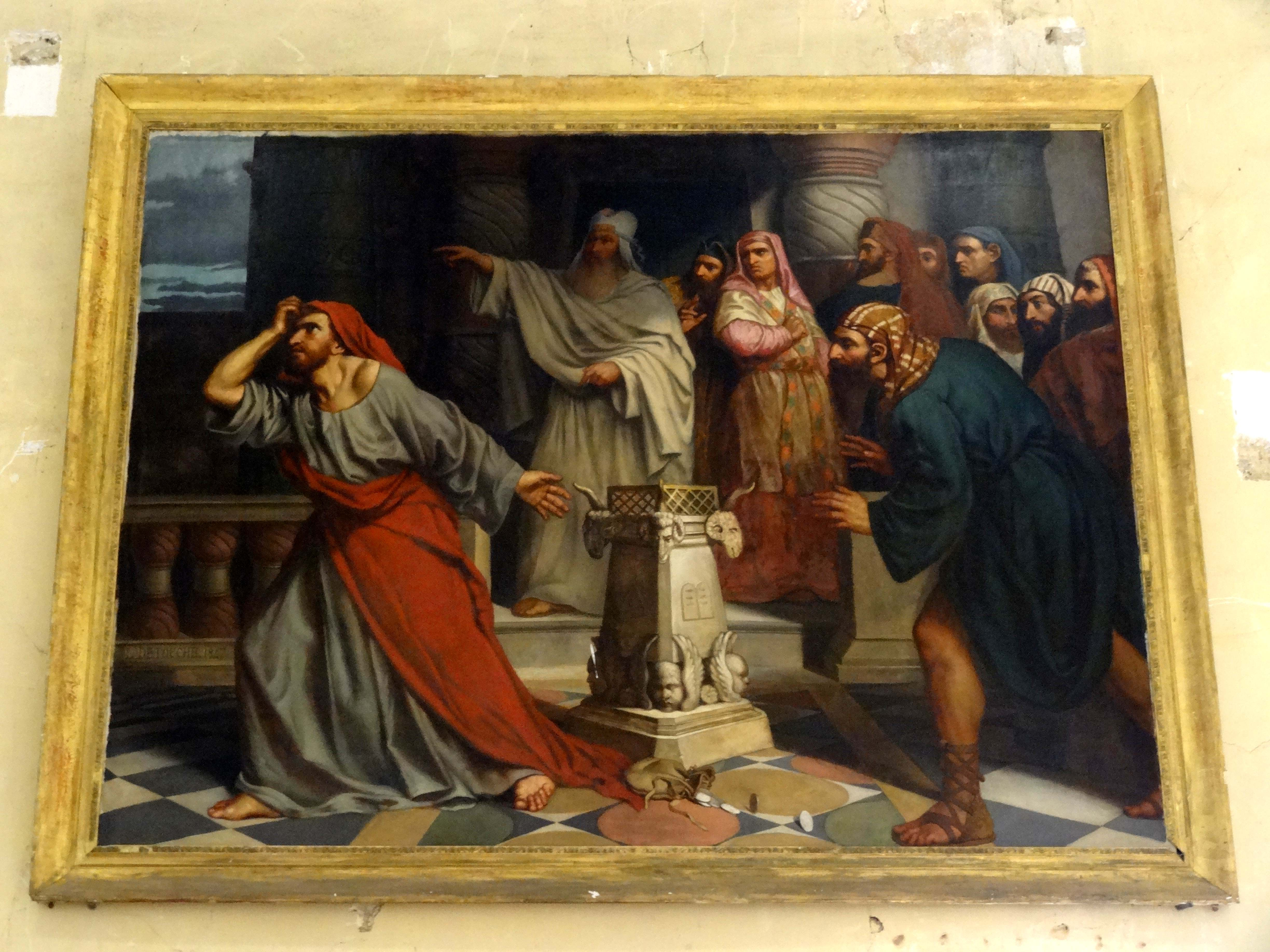 Tableau monumental - Le désespoir de Judas, par Destouches, 1847.